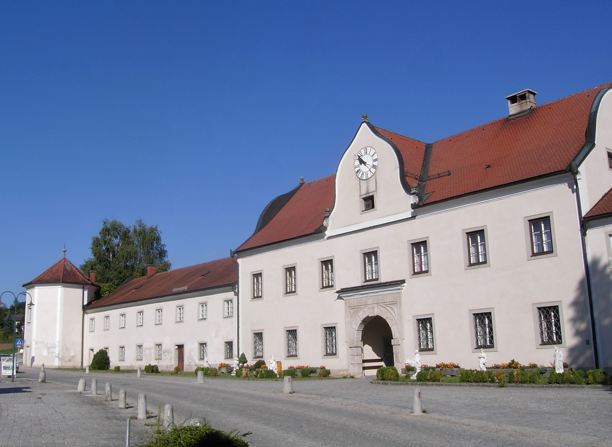 Steyr Gleinker Hauptstraße 20, Gesamtanlage ehemaliges Benediktinerstift samt Pfarrhof, Pfarrhof, südansicht